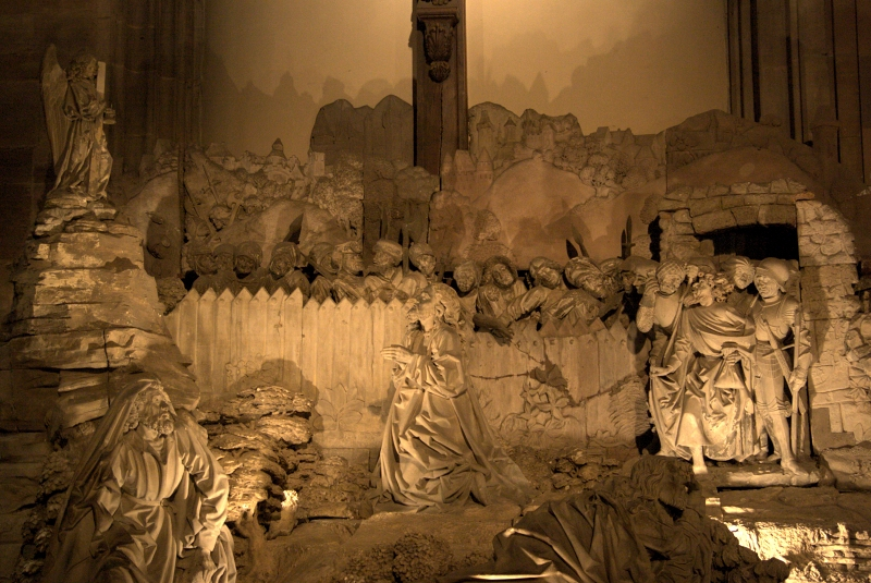 Sculpture du mont des oliviers de la Cathédrale de Strasbourg